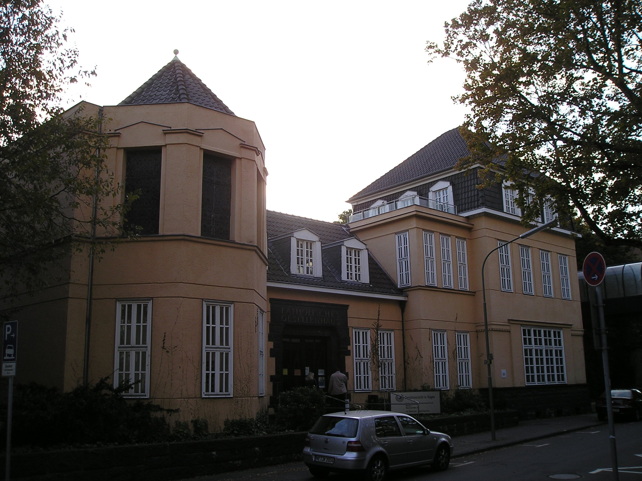 Studienzentrum der Fernuniversität Hagen in Neuss in den Räumen des Quirinus-Gymnasiums